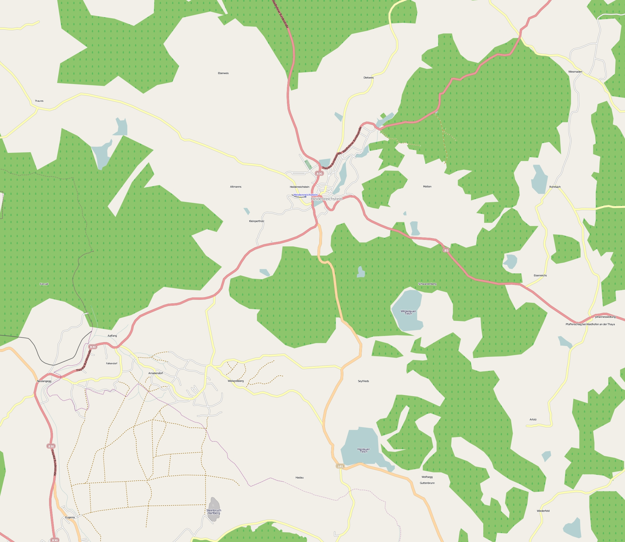 OpenStreetMap Gemeinde Heidenreichstein